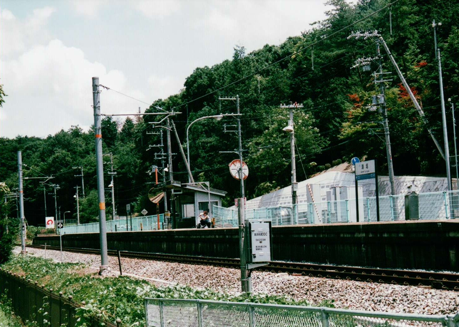 淵垣駅(2010/07/17)